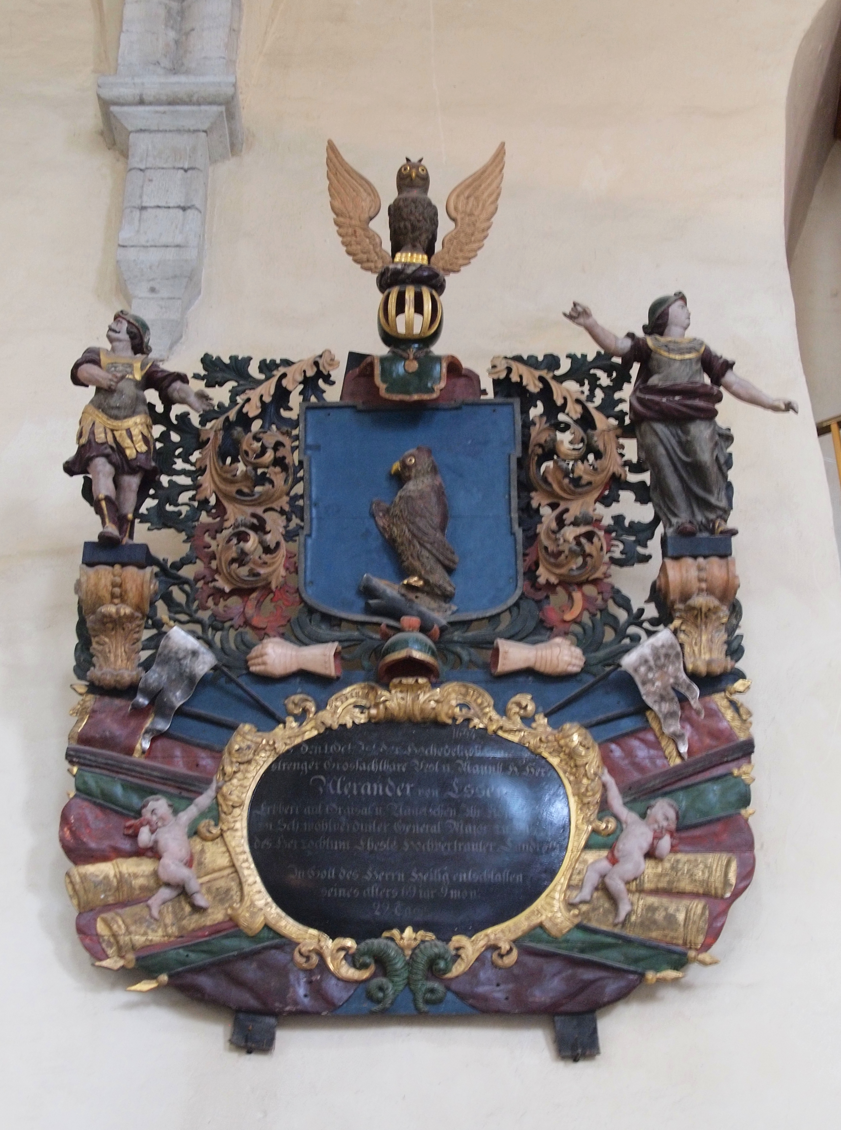 Eestimaa aadliku ja Rootsi ohvitseri Alexander von Esseni vappepitaaf Niguliste kirikus